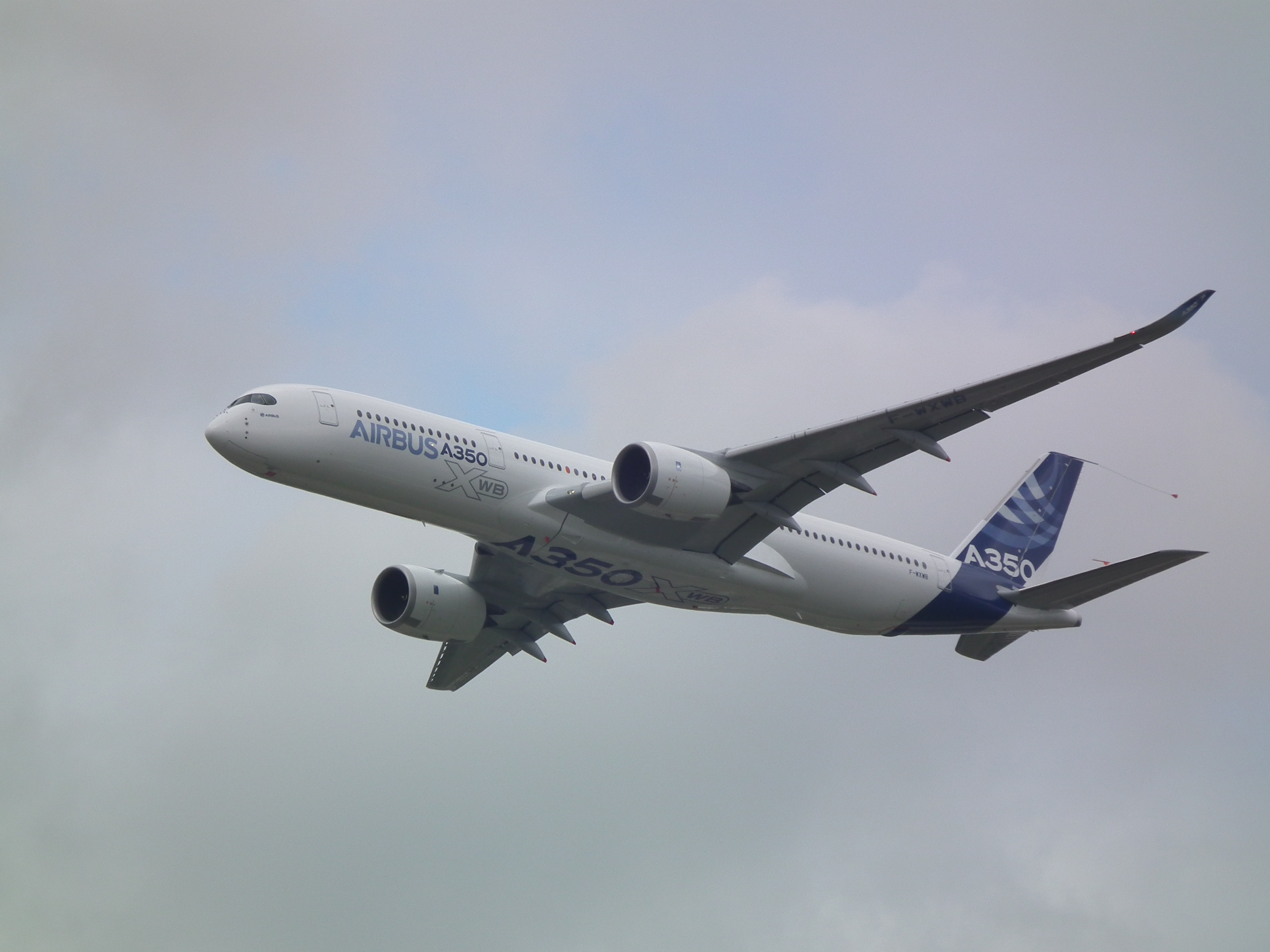 vol au Bourget